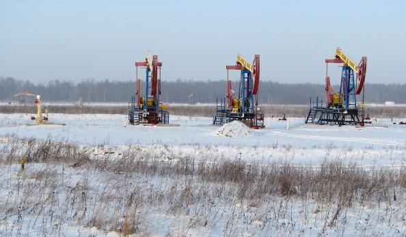 Нефтянные качалки